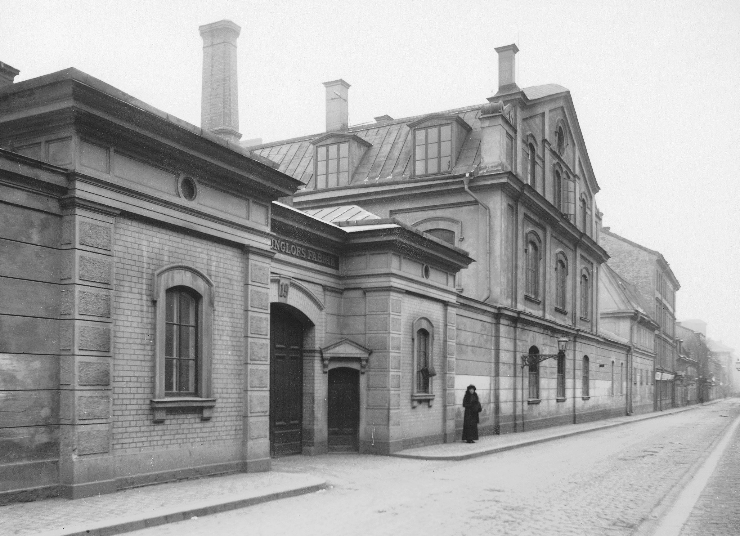 Ljunglöfska snusfabriken mot Luntmakargatan. Arkitekt C N Söderberg 1878